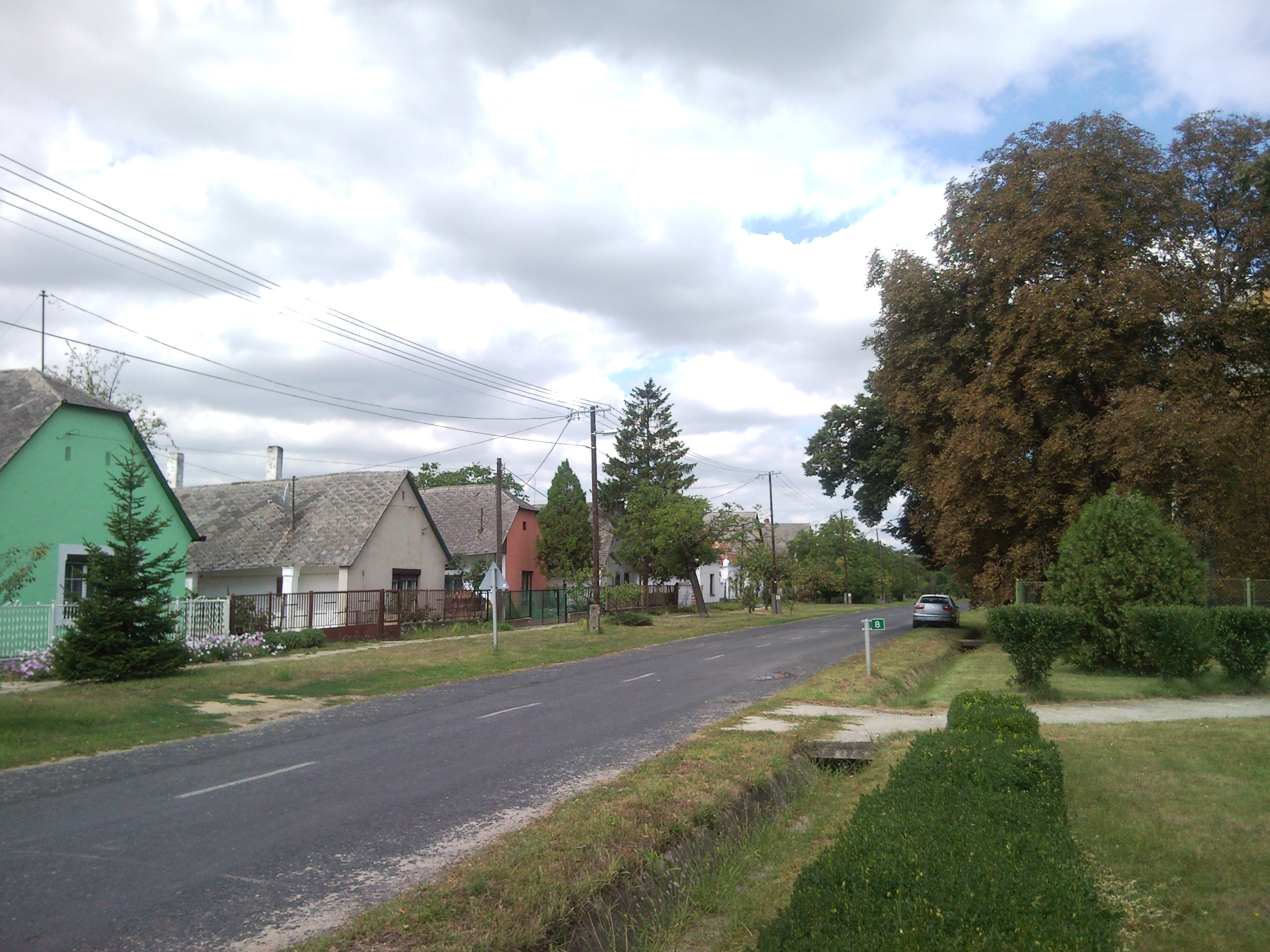 Bakonysárkány, 2861 Hungary